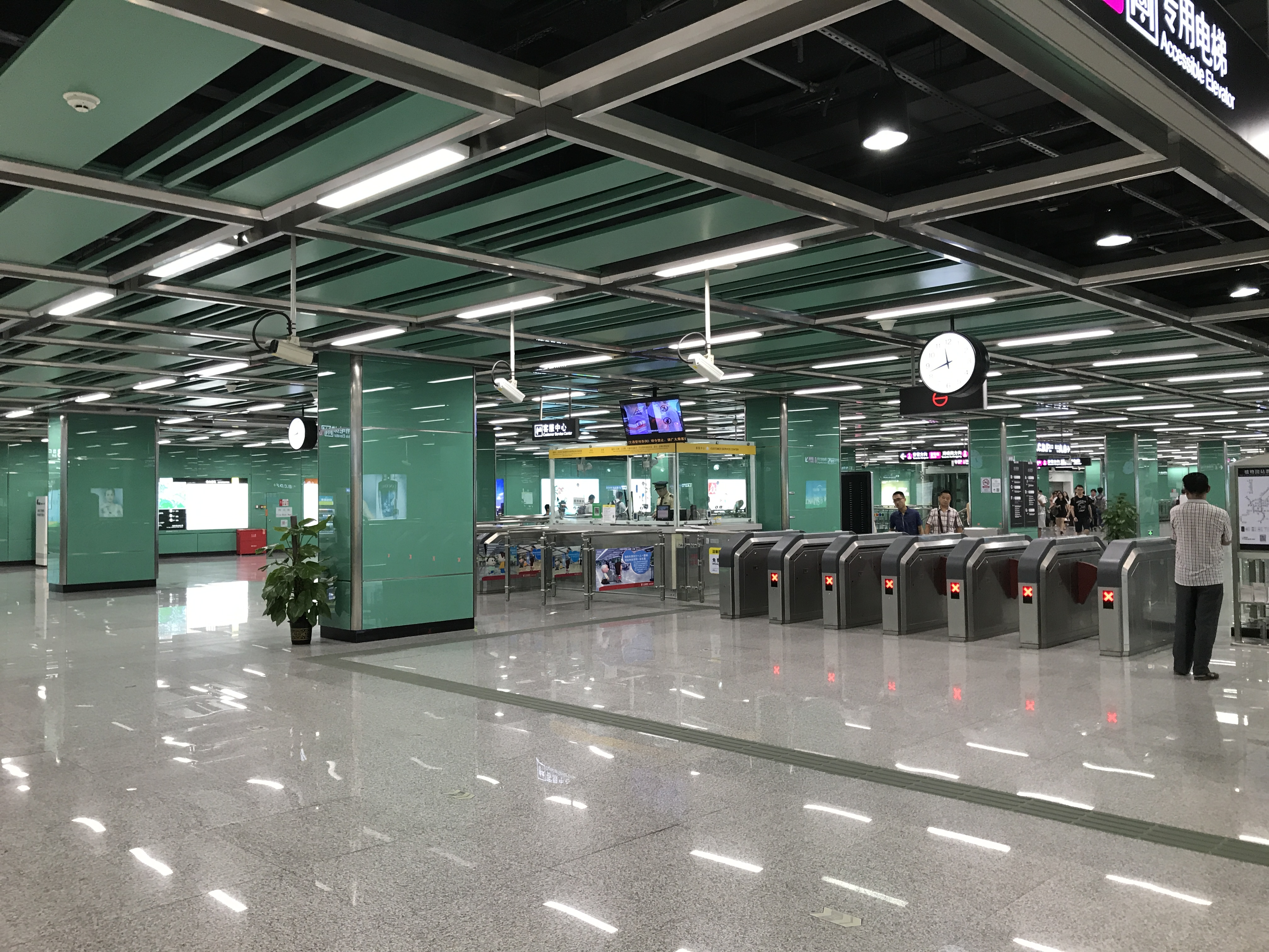 广州地铁植物园站